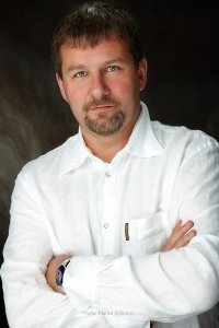 2011. aastal